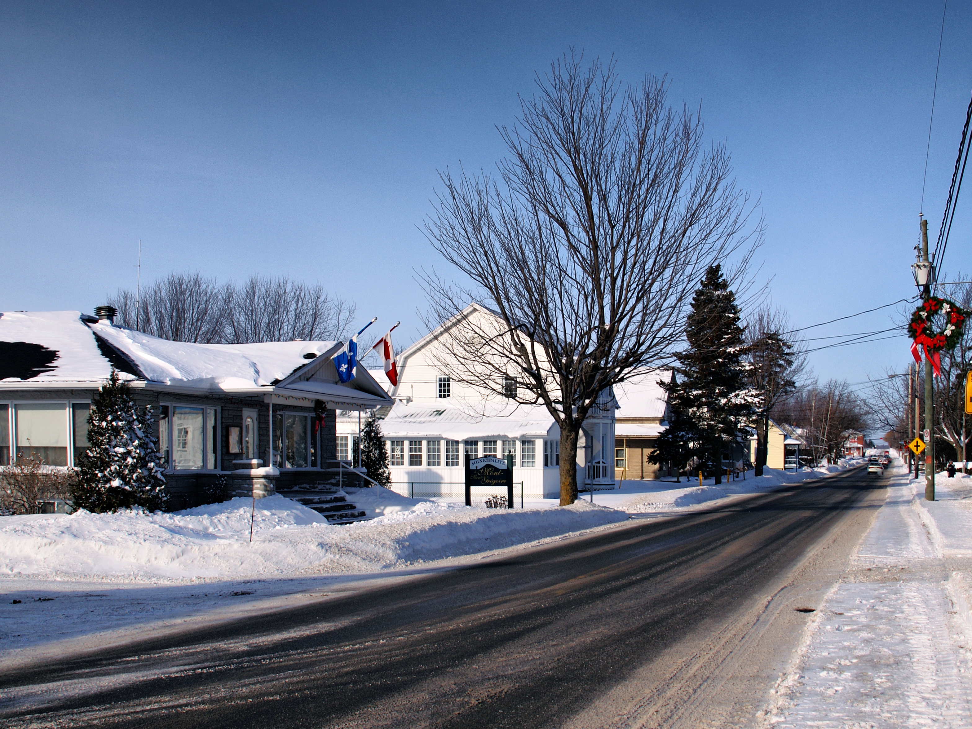 Mont-Saint-Grégoire - La Mairie Rue Saint-Joseph